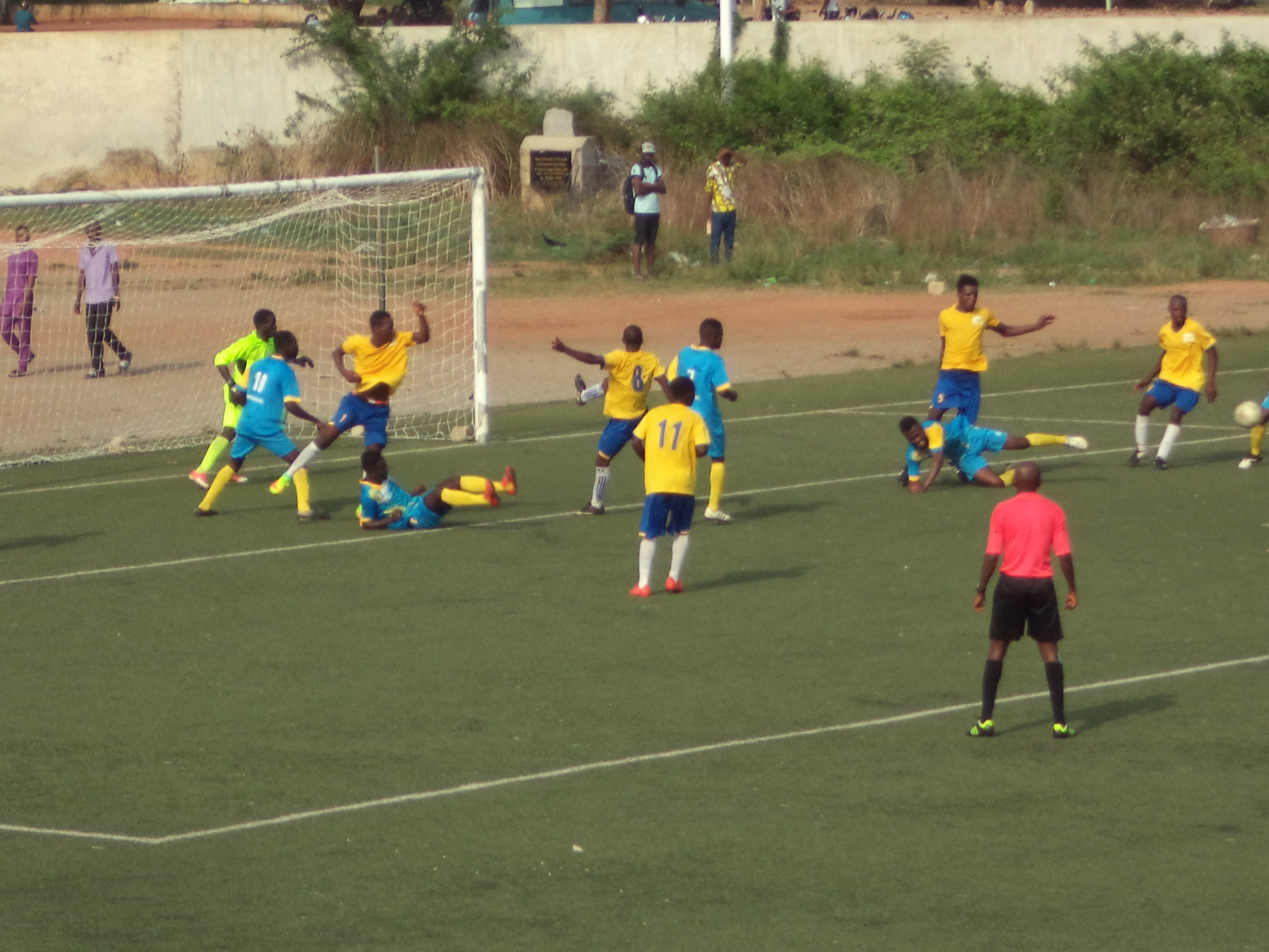 Cafoullage dans la surface de réparation de UNB FC .